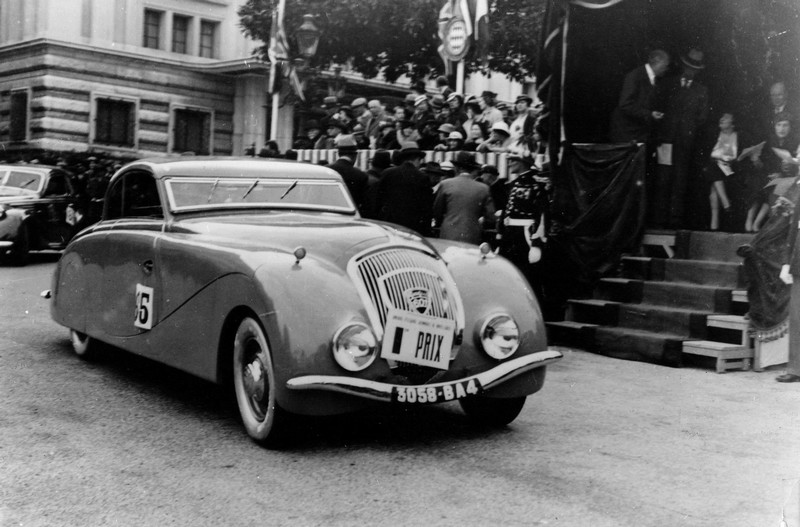 Peugeot 601 DL Eclipse carrossée par Pourtout, voiture personnelle de Marcel Pagnol, apparaît dans le film "Le Schpountz"